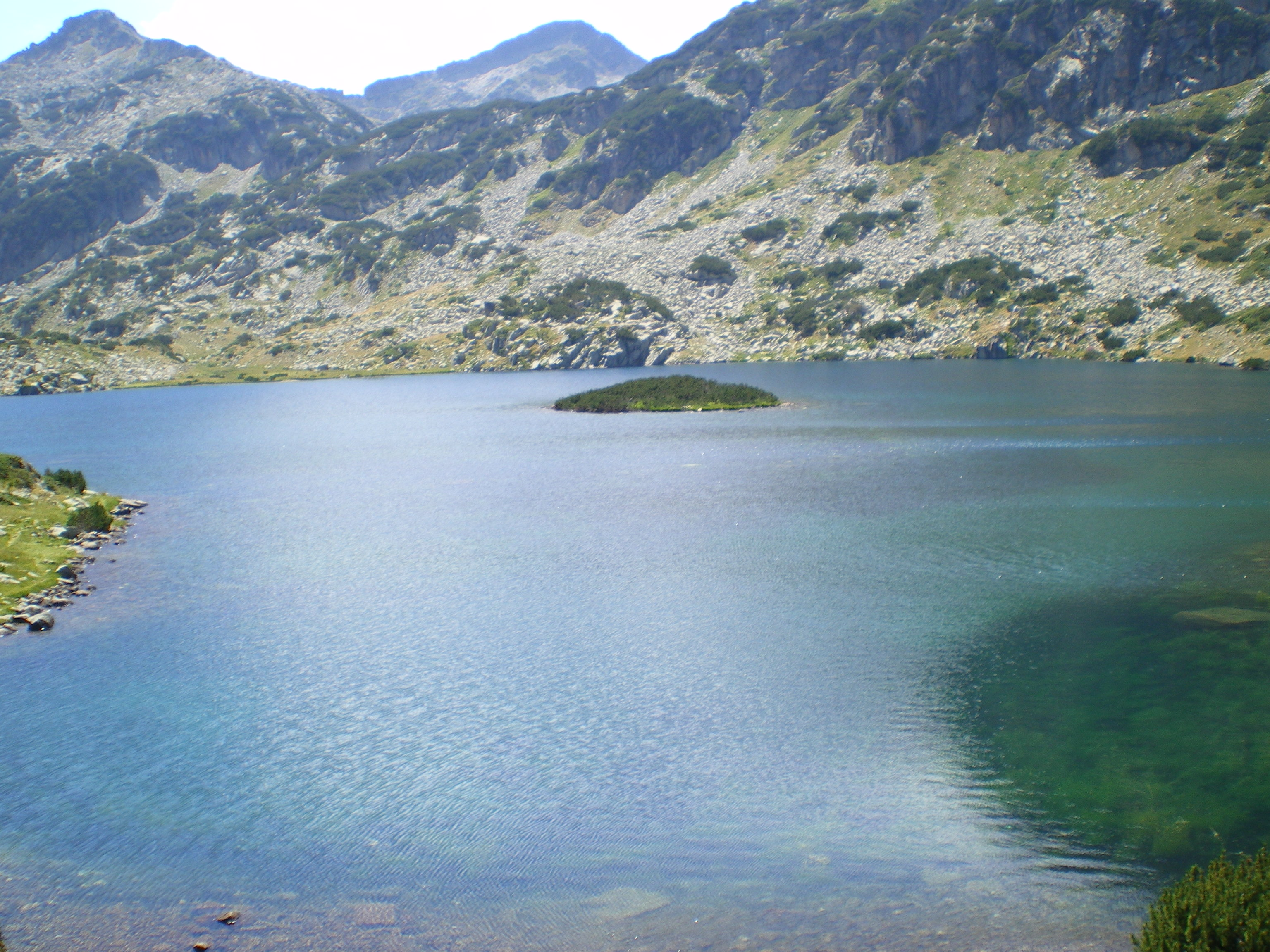 Popovo lake, Pirin, Bulgaria